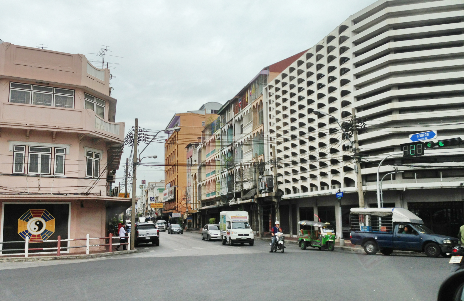 Luang-krung kasem rd, wat thepsirin,Pom Prap Sattru Phai,bangkok